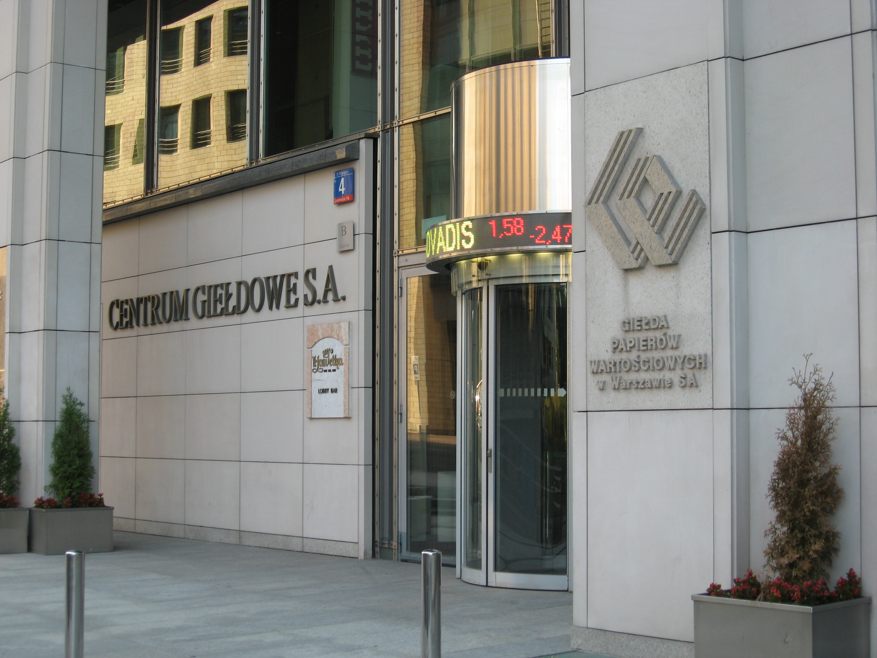 Budynek Giełdy Papierów Wartościowych w Warszawie